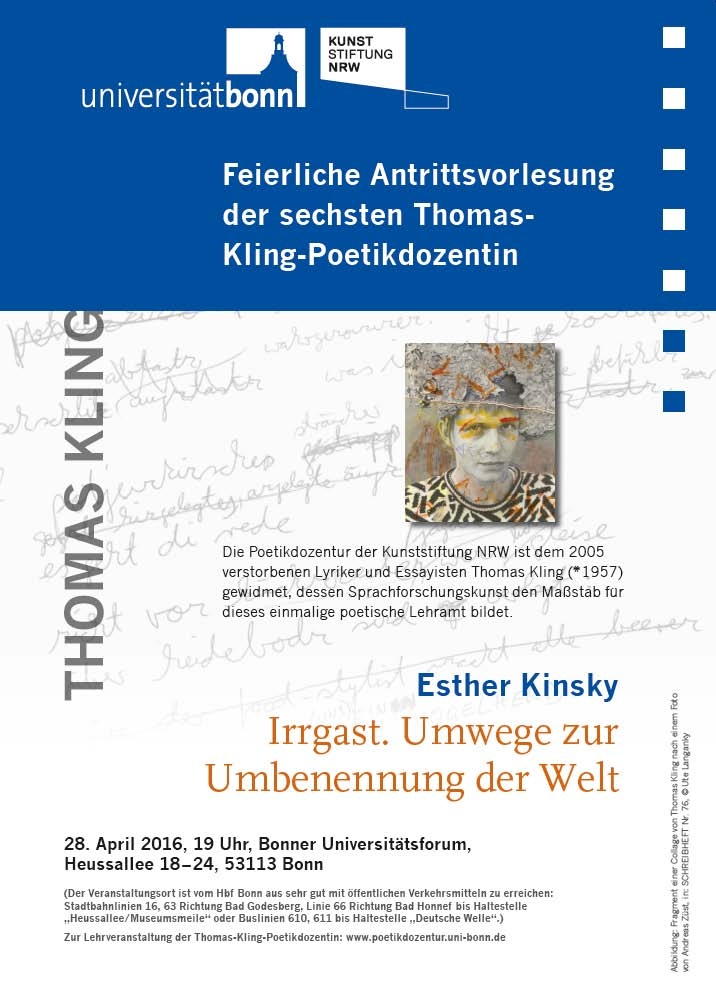 Antrittsvorlesung